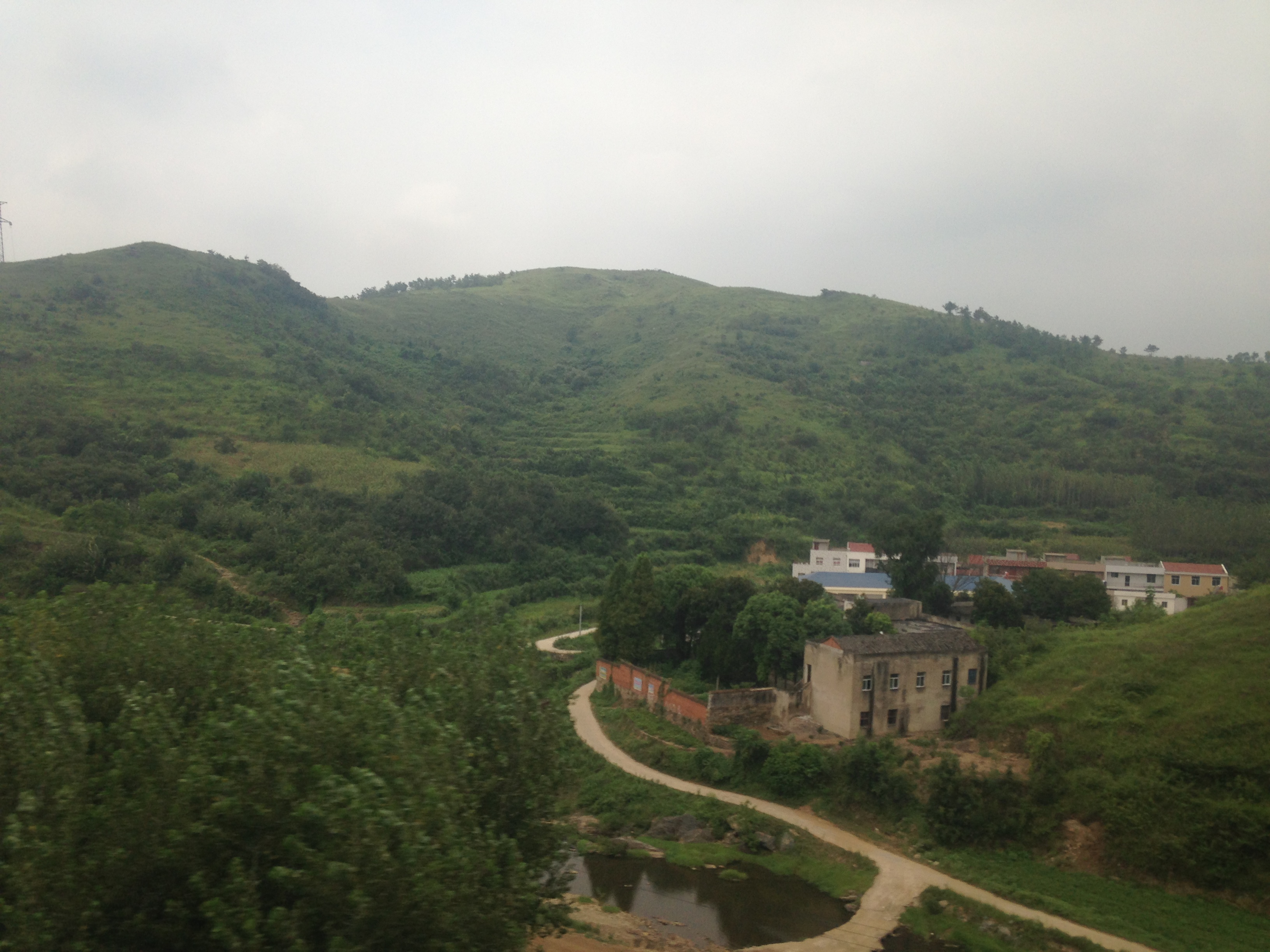 石武旅客専用線の列車内より望む孝感市大悟県東新郷付近の景色